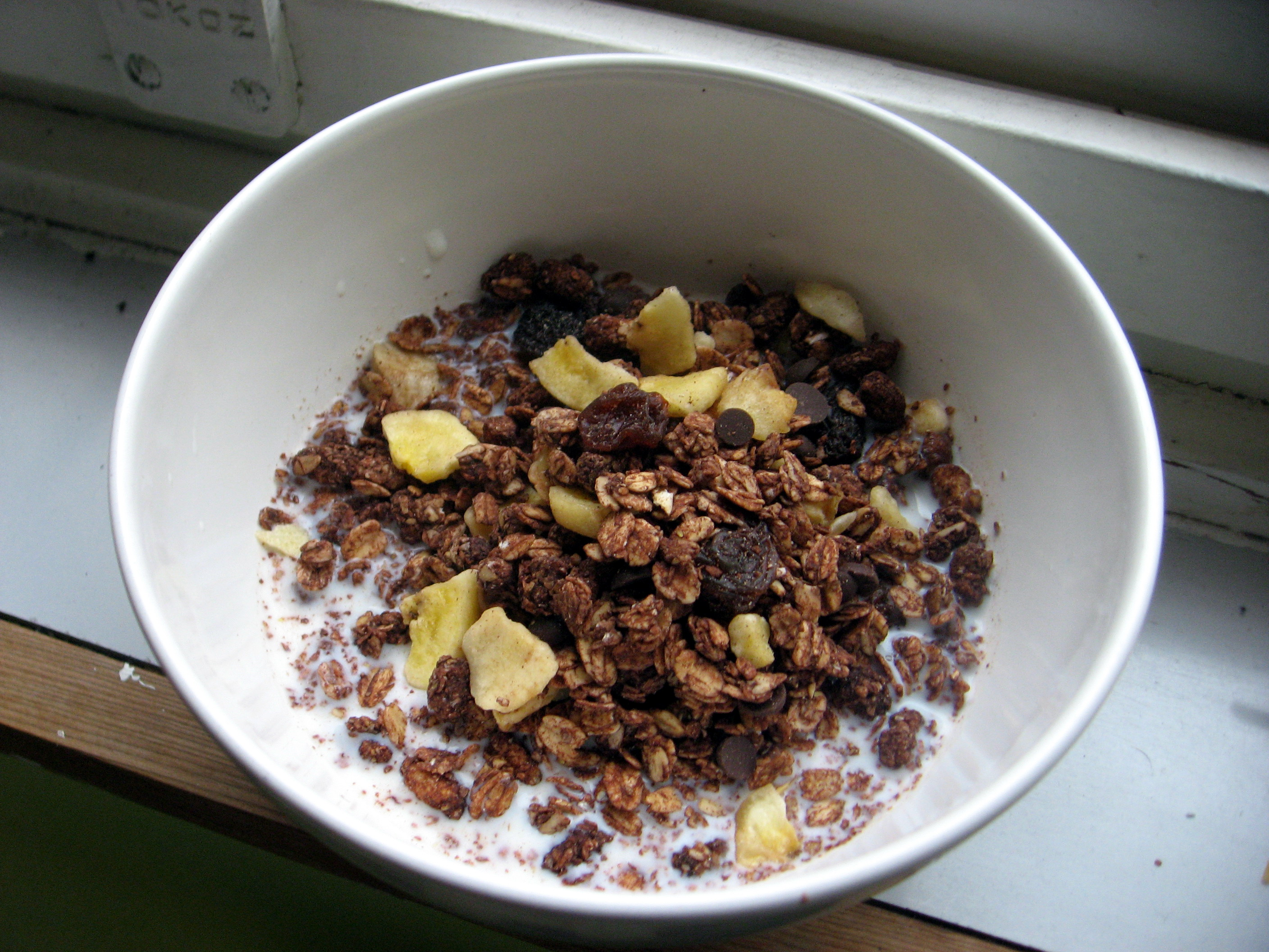 Čokoládové müsli s hrozinkama a sušeným banánem